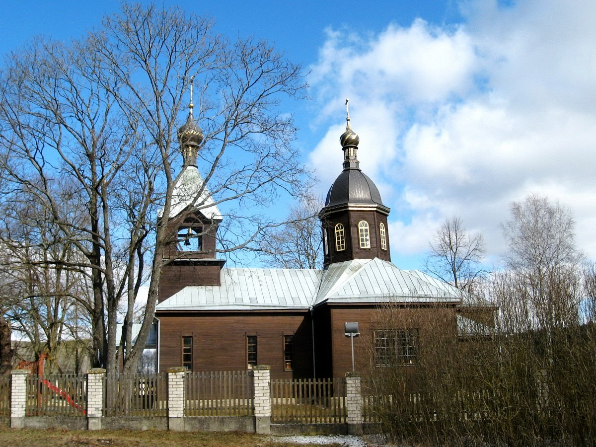 Кіявец. Царква Святой Тройцы